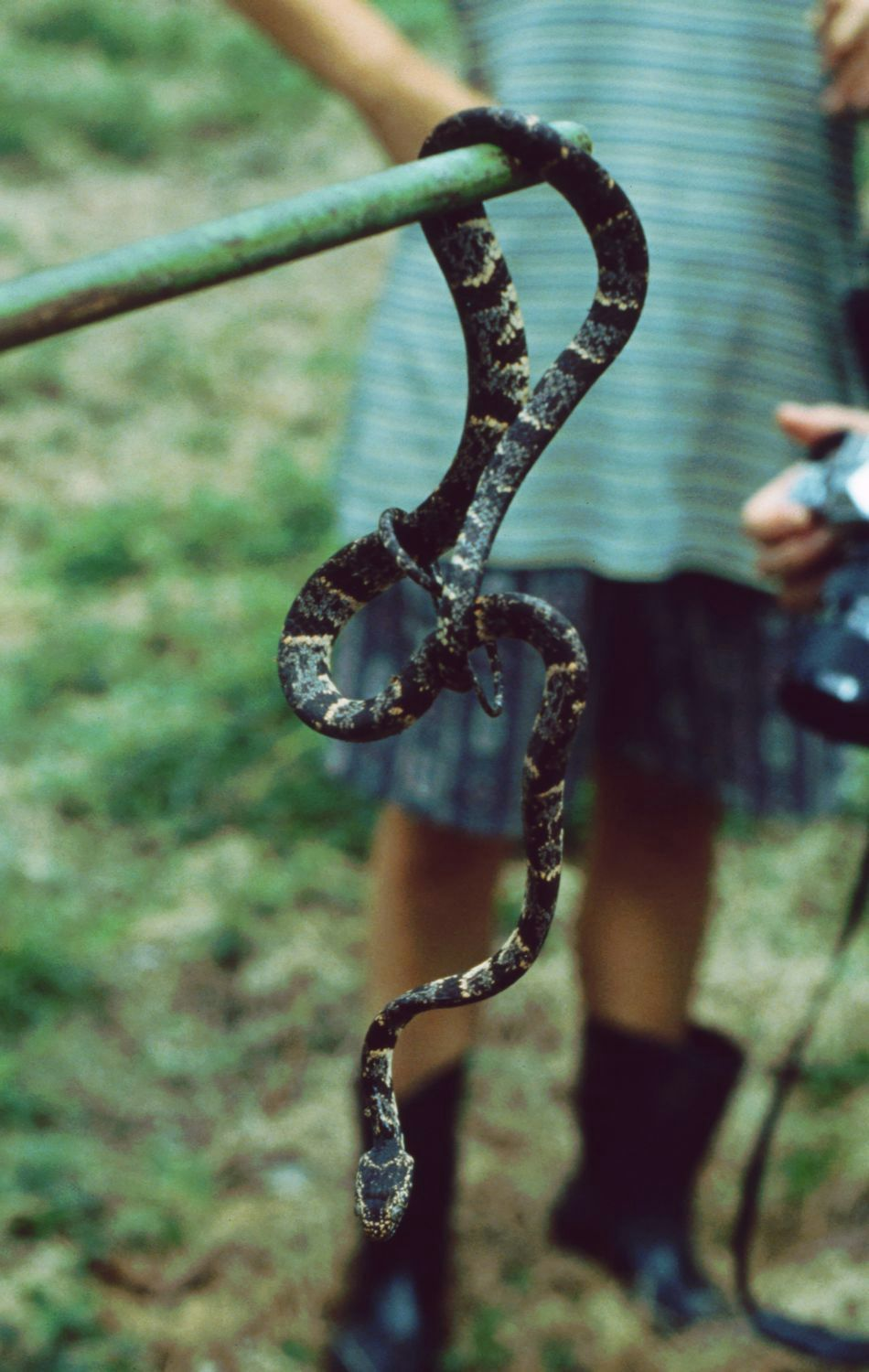 Sibon nebulatus, Nattern (Colubridae) - Costa Rica: Prov. Puntarenas, La Gamba NW Golfito, "Esquinas Rainforest Lodge"